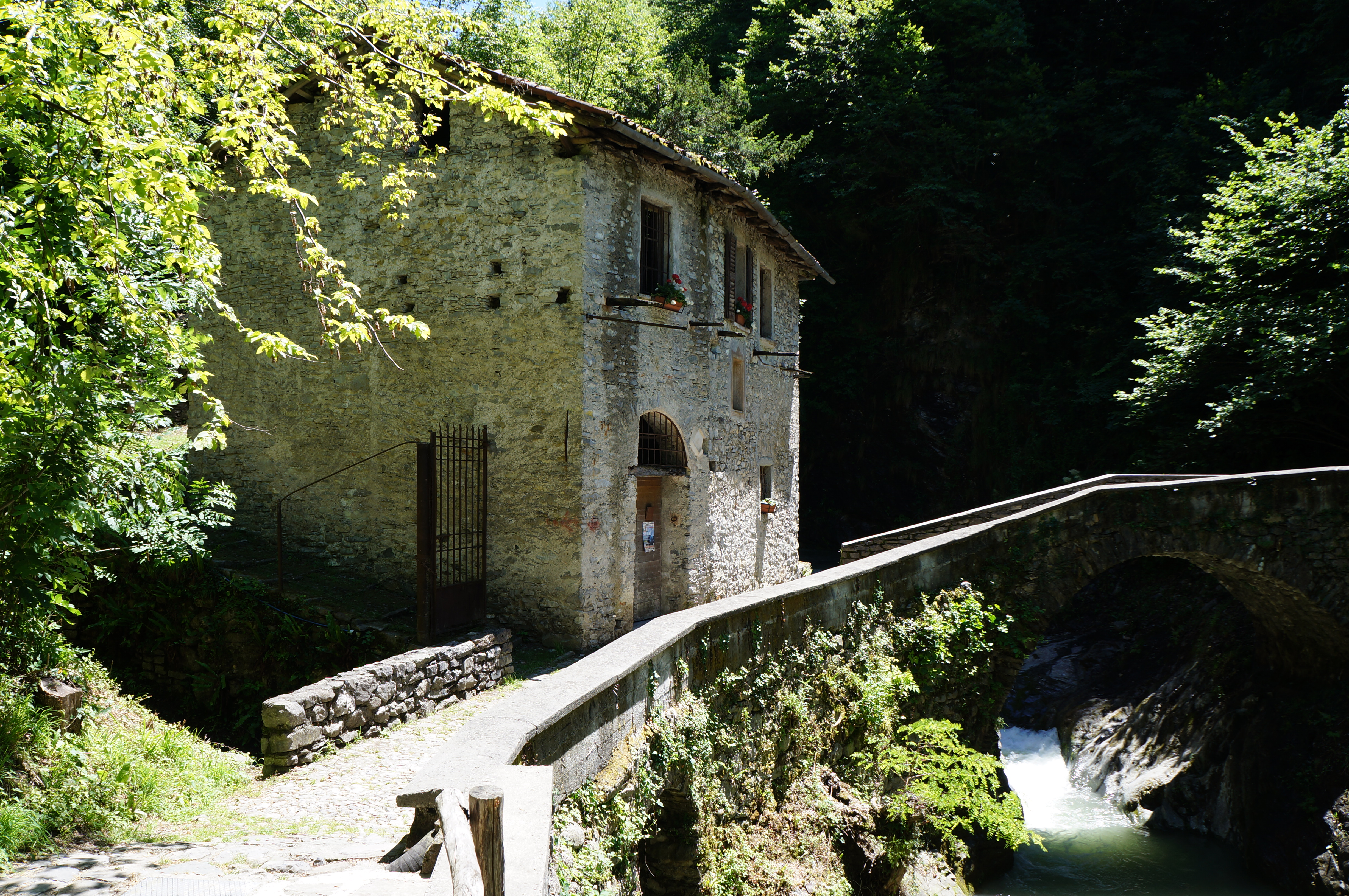 Mulino costruito nel XVI secolo, attivo sino agli anni cinquanta del XX secolo. Storicamente è stato utilizzato per macinare frumento e castagne degli agricoltori locali. La ruota veniva alimentata grazia all'afflusso del torrente Esino su cui è costruito.